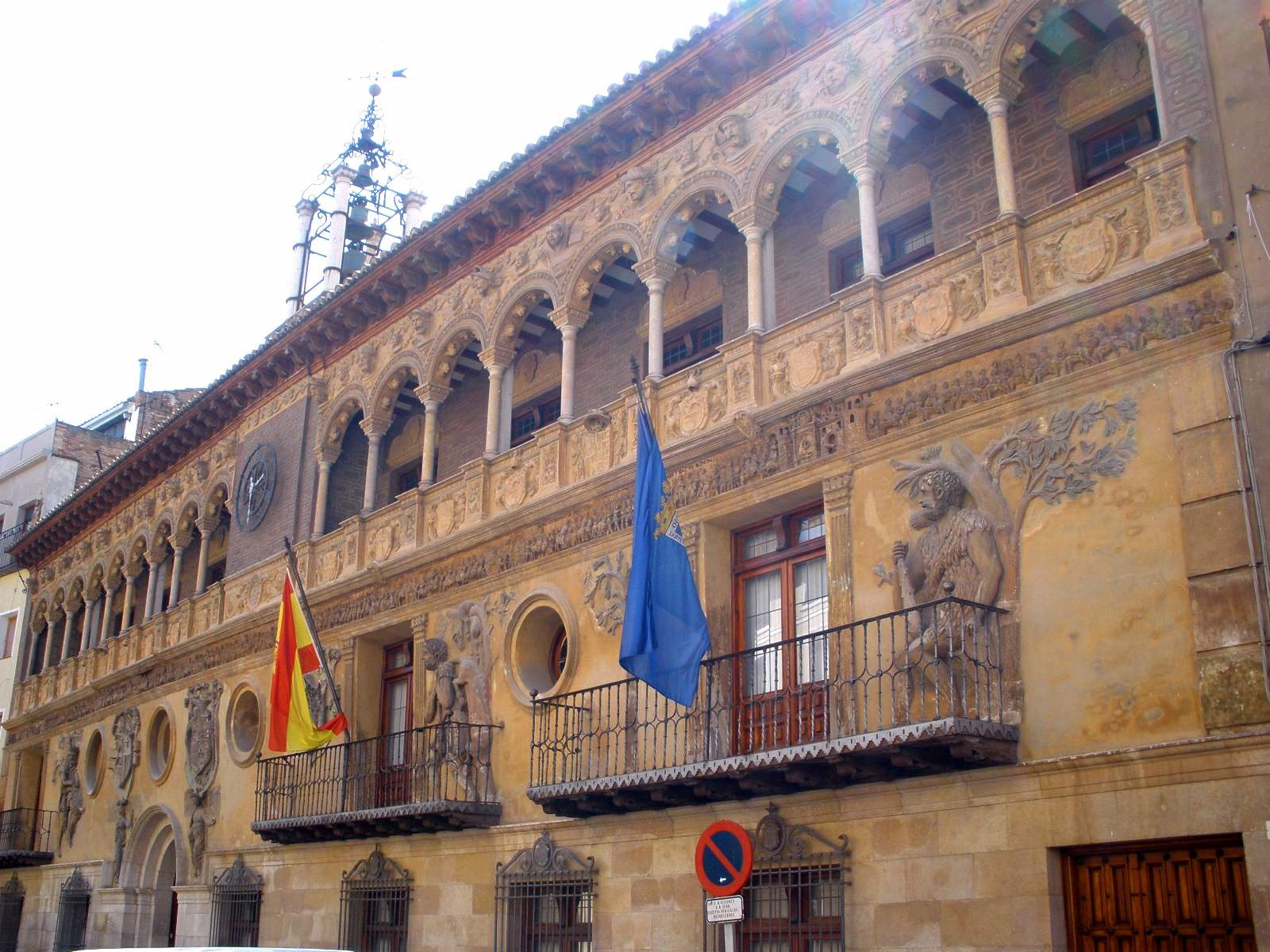 Ayuntamiento de Tarazona